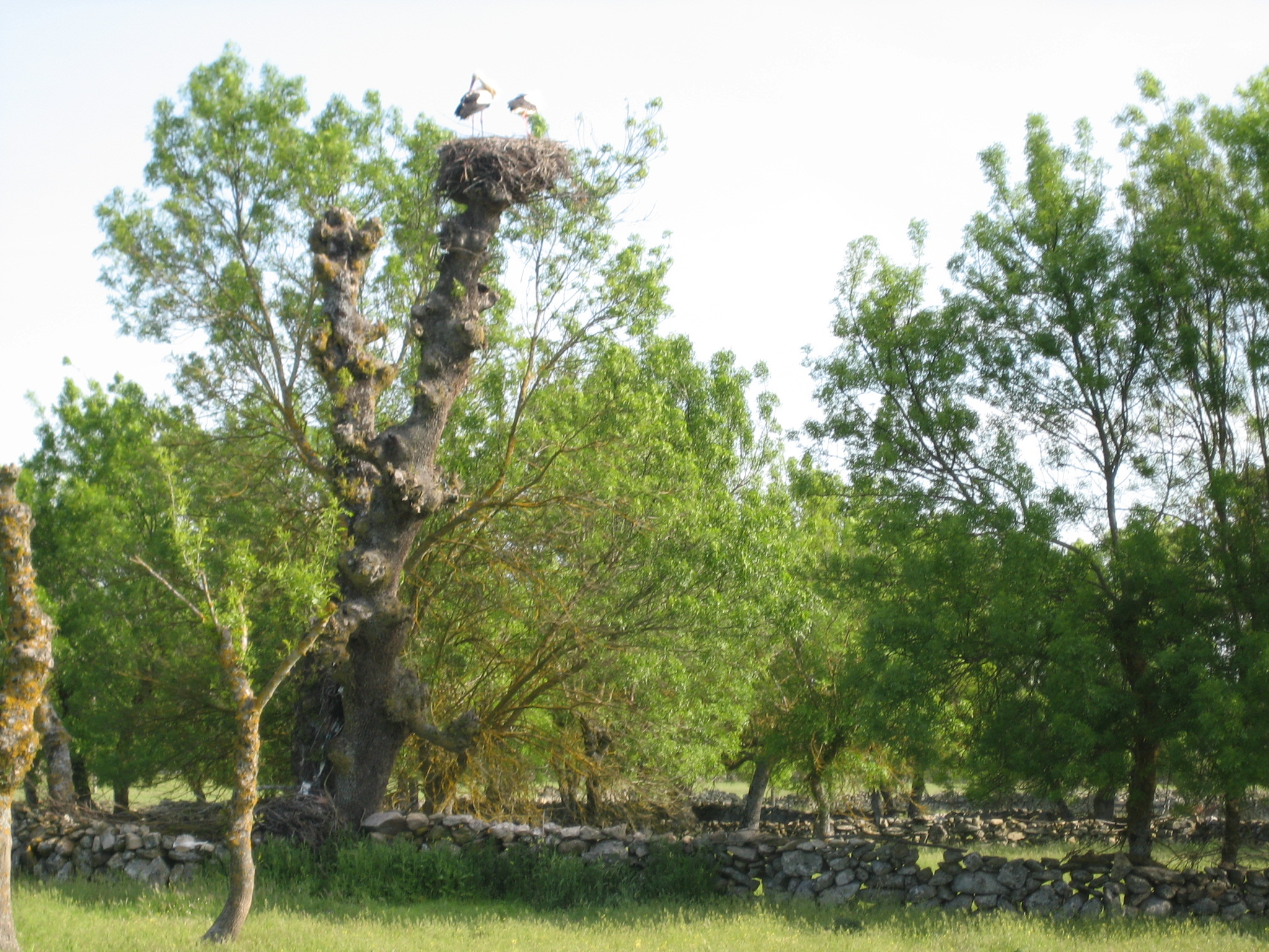 Cigüeñas en Tudera –Zamora–.